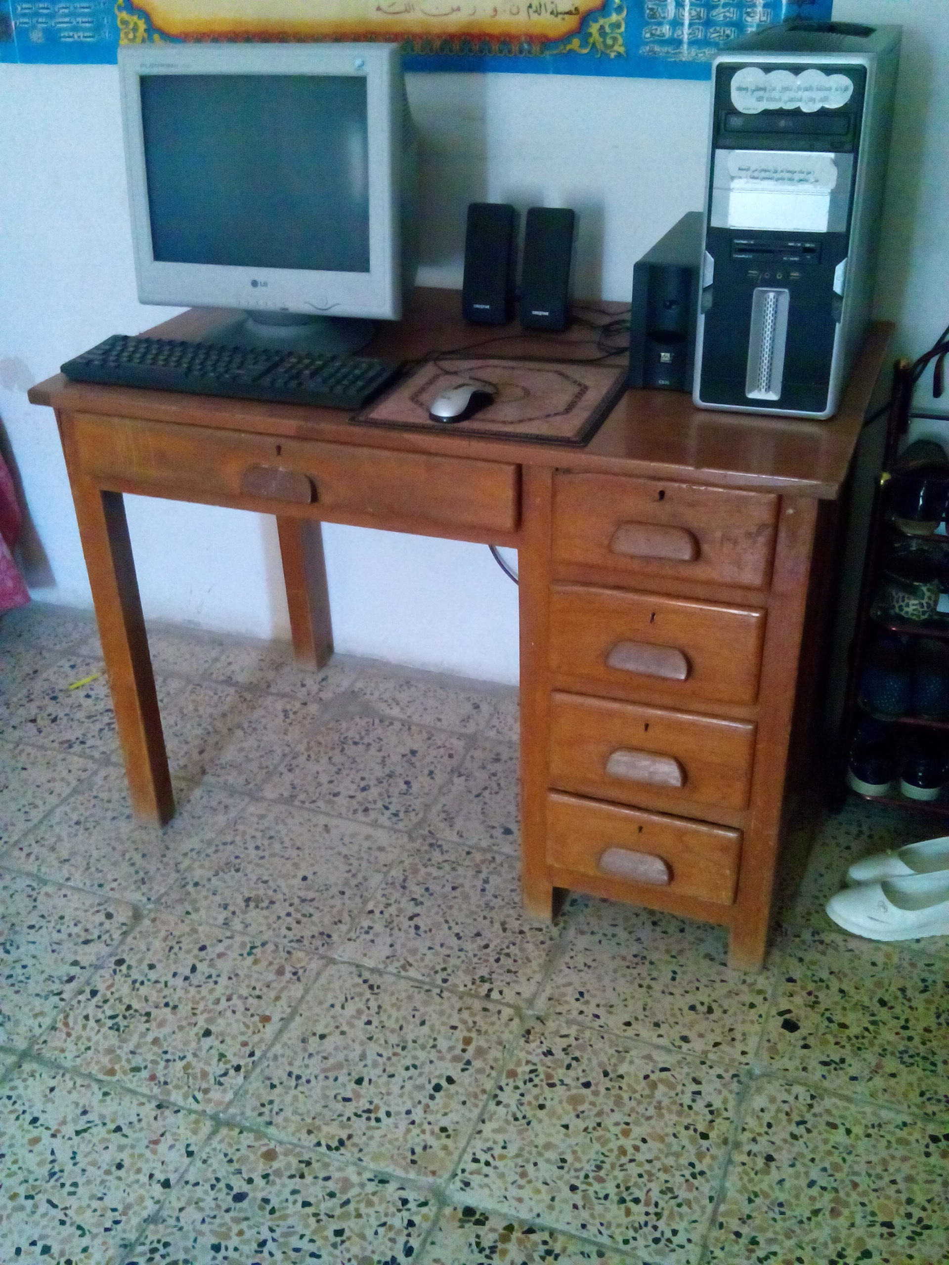 مكتب خشبي تراثي قديم للكتابة وضع عليه آلة حاسوب حديثة